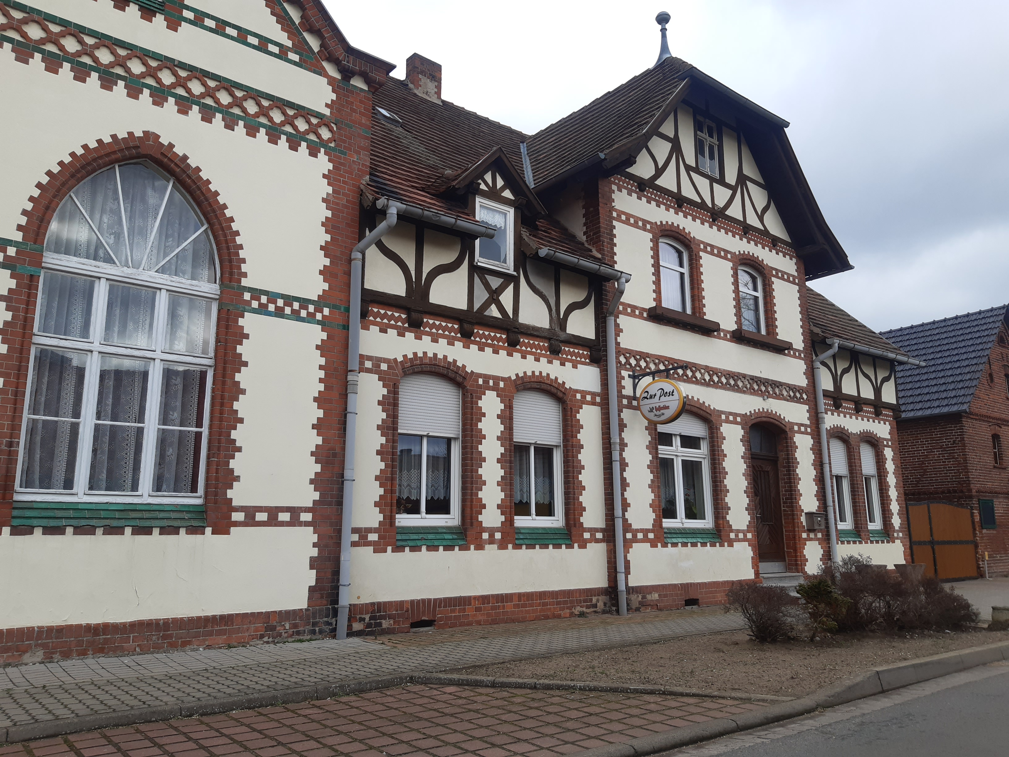 Gasthof